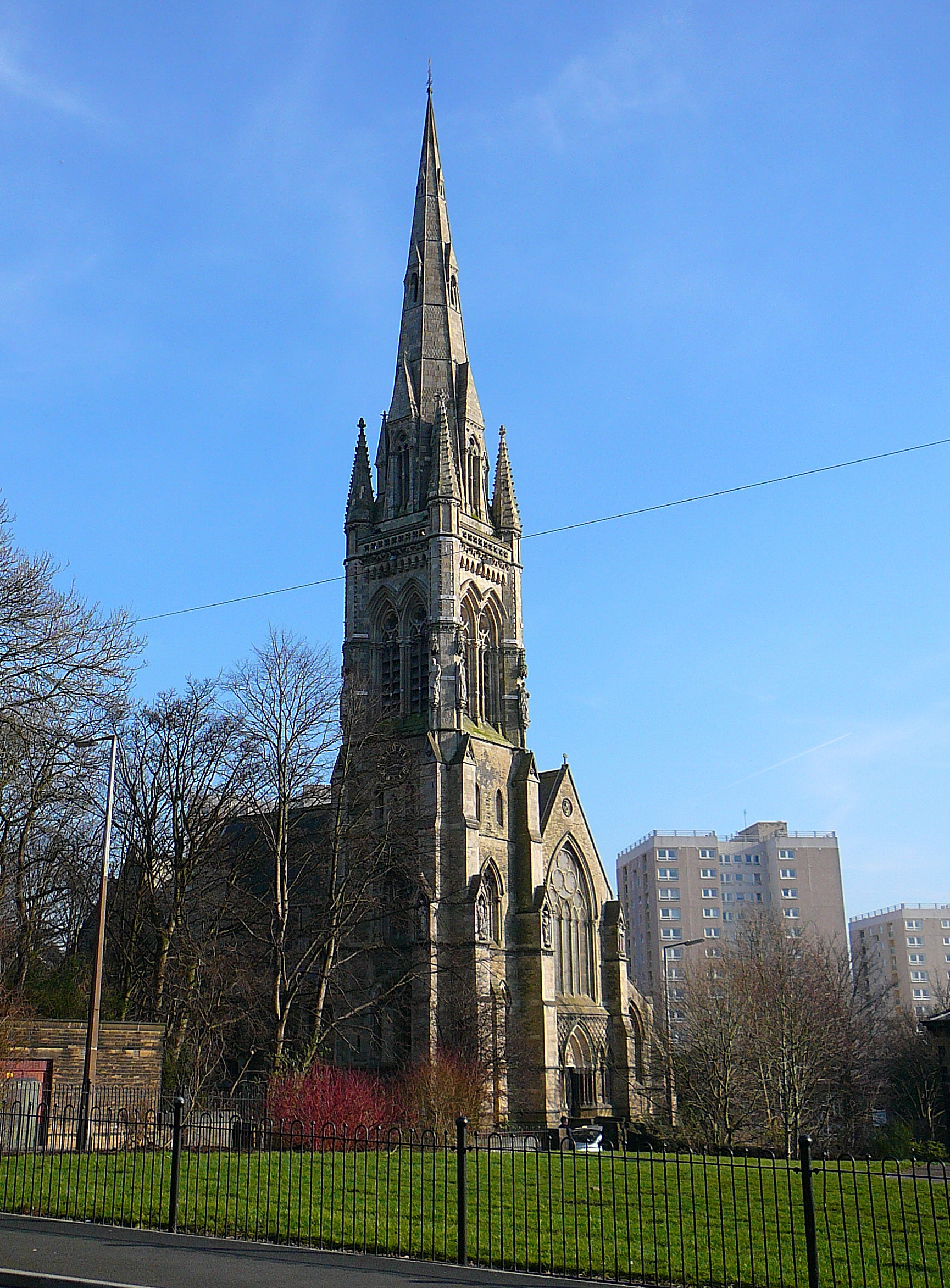 Akroydon, Halifax